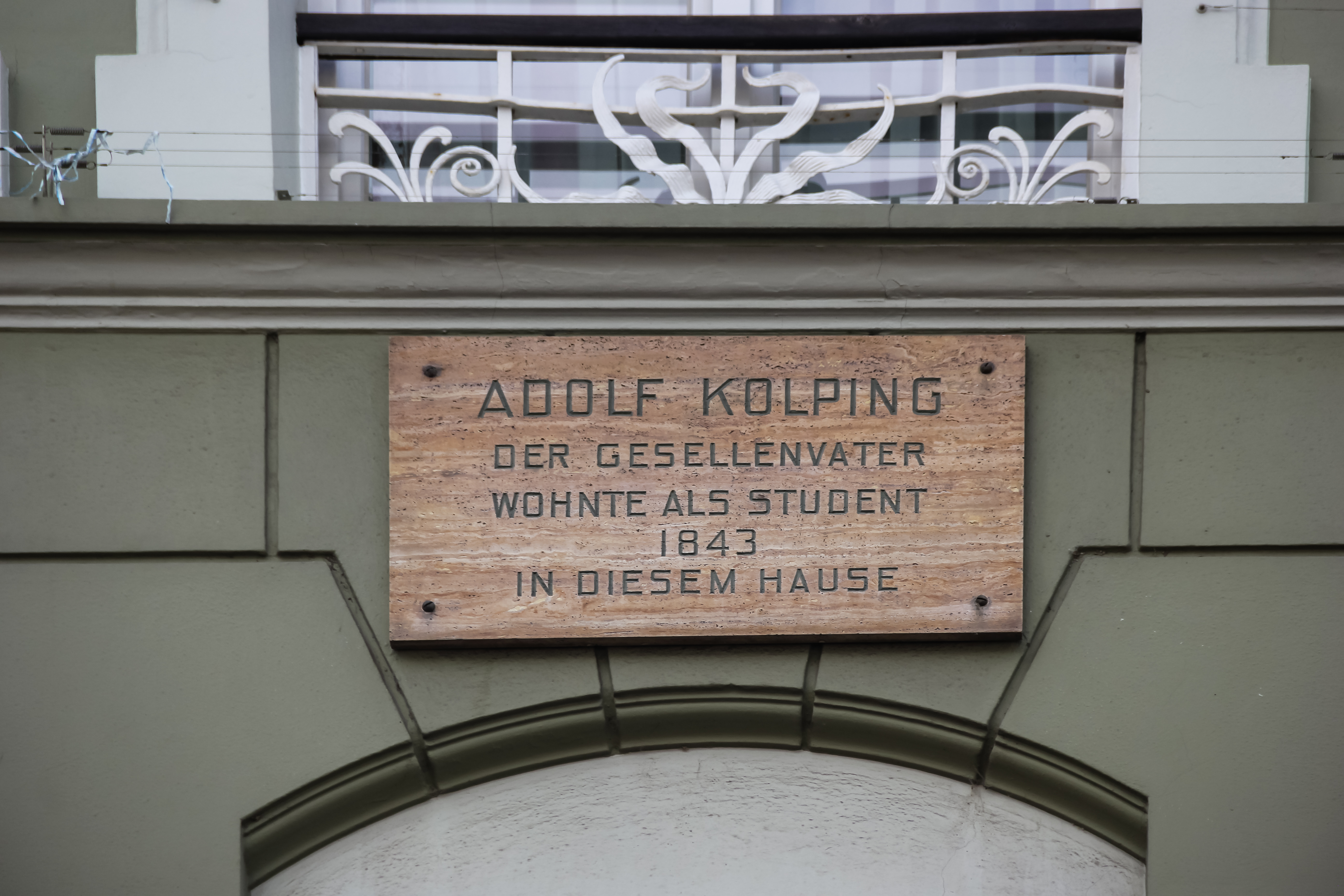 Bonn, Sternstraße 59